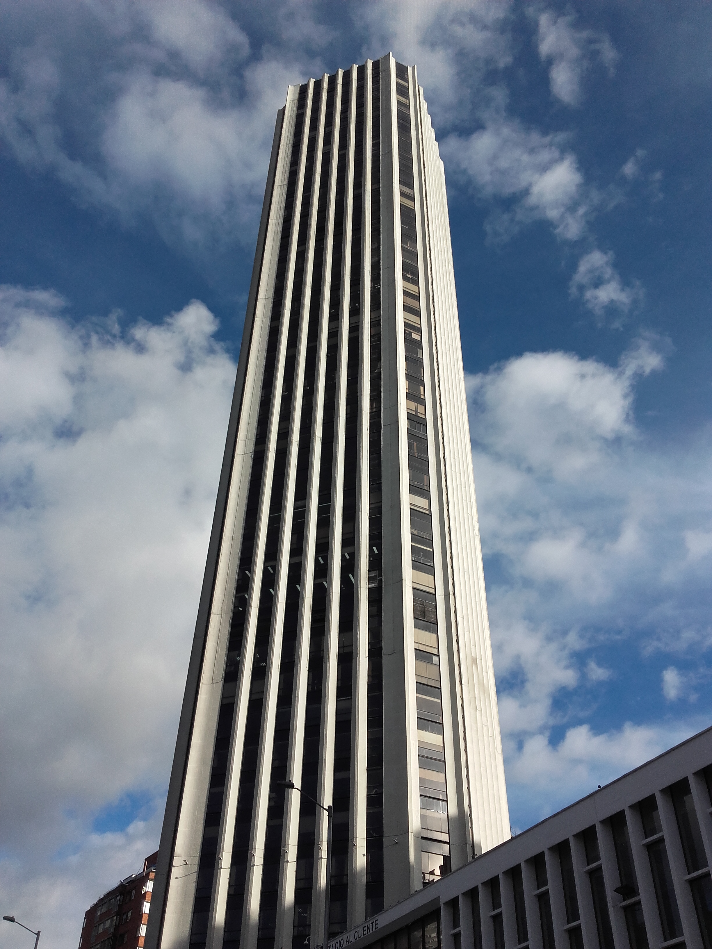 xjfjxjjxjcjcjncncncncncbc